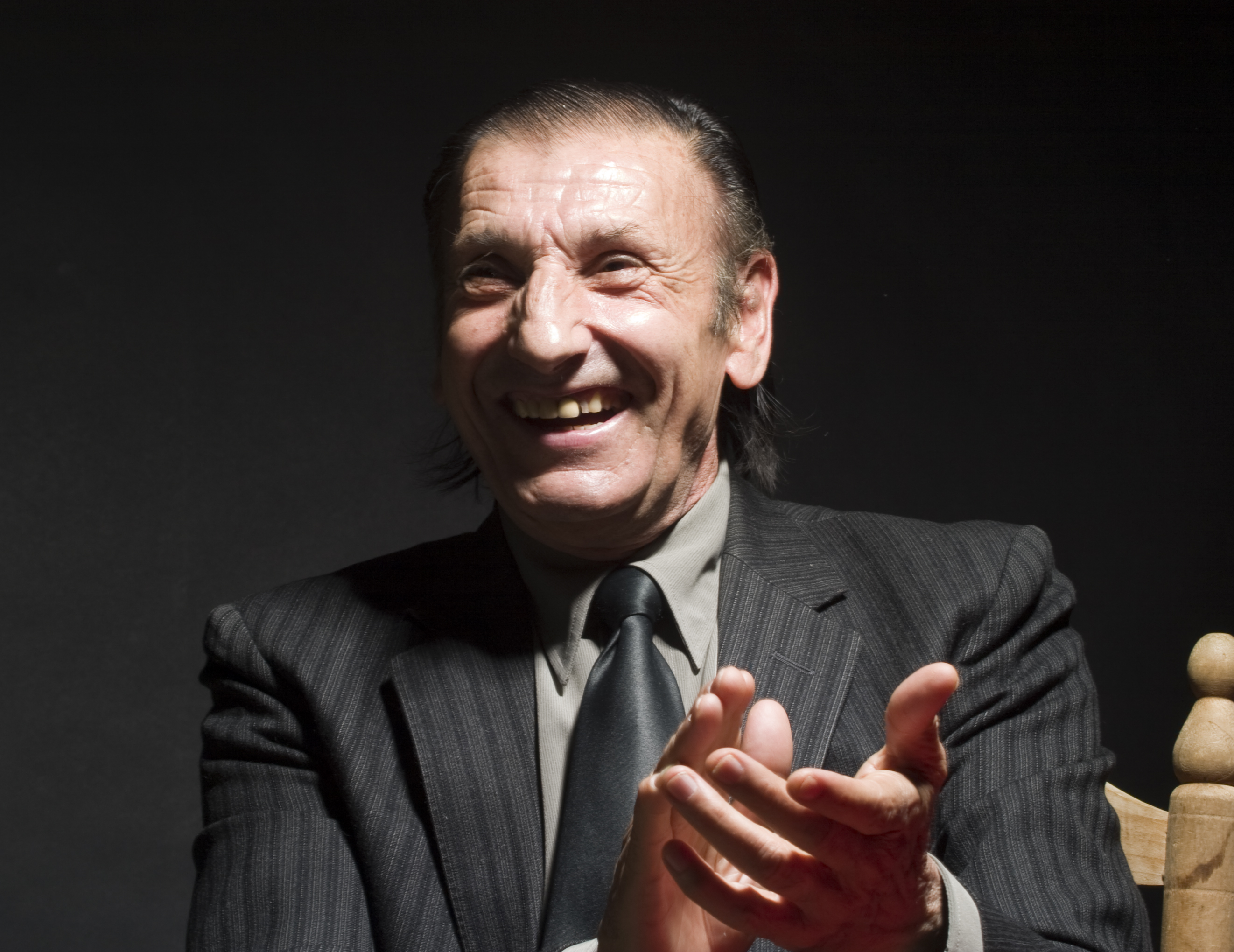 Imagen de estudio Lázaro.